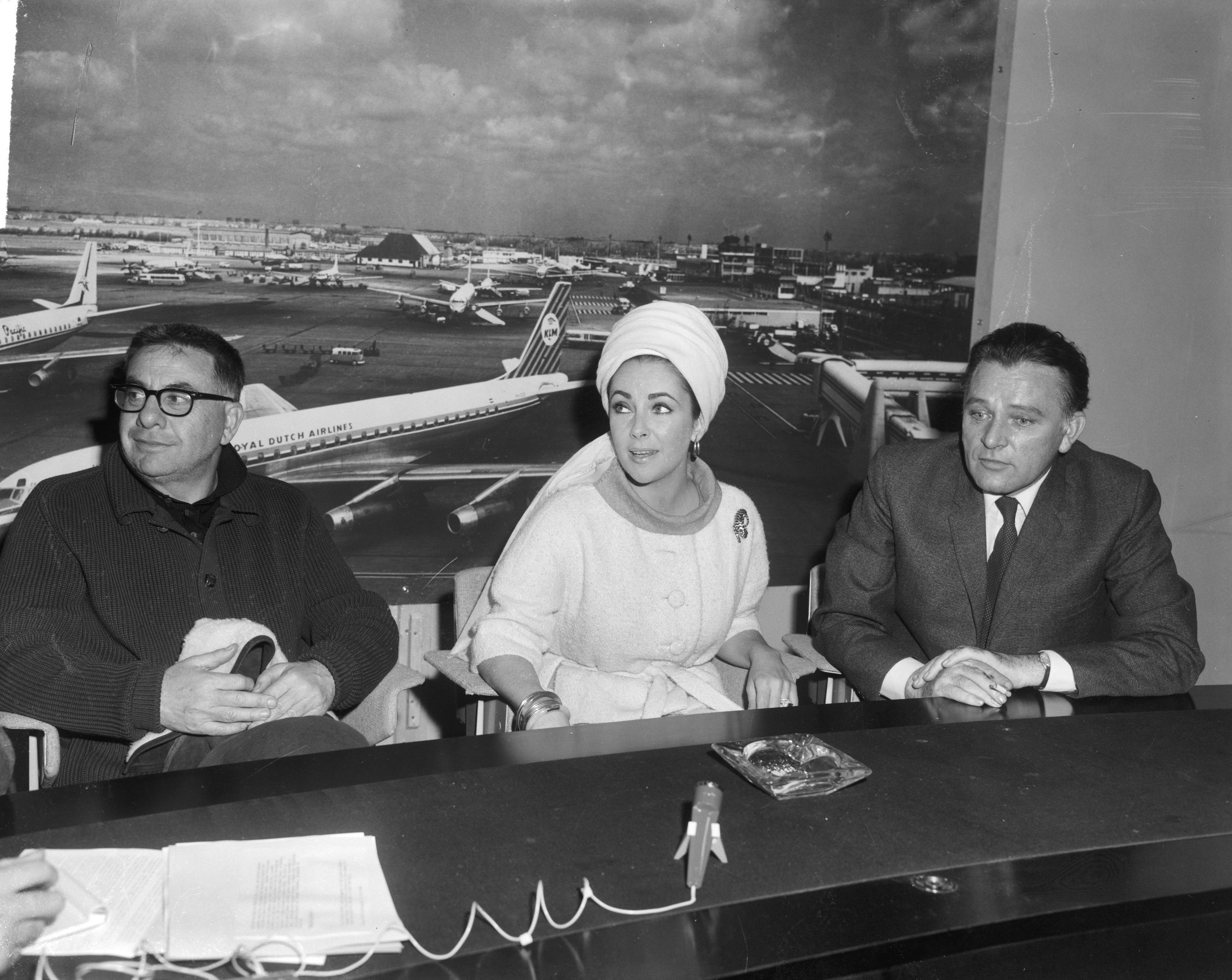 Collectie / Archief : Fotocollectie Anefo Reportage / Serie : [ onbekend ] Beschrijving : Liz Taylor en Richard Burton bij aankomst op Schiphol, waar zij een persconferentie geven, links de regisseur Martin Ritt [betreft film "The spy who came in from the cold", waarin Richard Burton de hoofdrol speelde, red.]. Datum : 26 april 1965 Locatie : Noord-Holland, Schiphol Trefwoorden : acteurs, actrices, filmsterren, persconferenties, regisseurs, vliegvelden Persoonsnaam : Burton, Richard, Ritt, Martin, Taylor, Elizabeth Fotograaf : Bilsen, Joop van / Anefo, [onbekend] Auteursrechthebbende : Nationaal Archief Materiaalsoort : Negatief (zwart/wit) Nummer archiefinventaris : bekijk toegang 2.24.01.04 Bestanddeelnummer : 917-6945